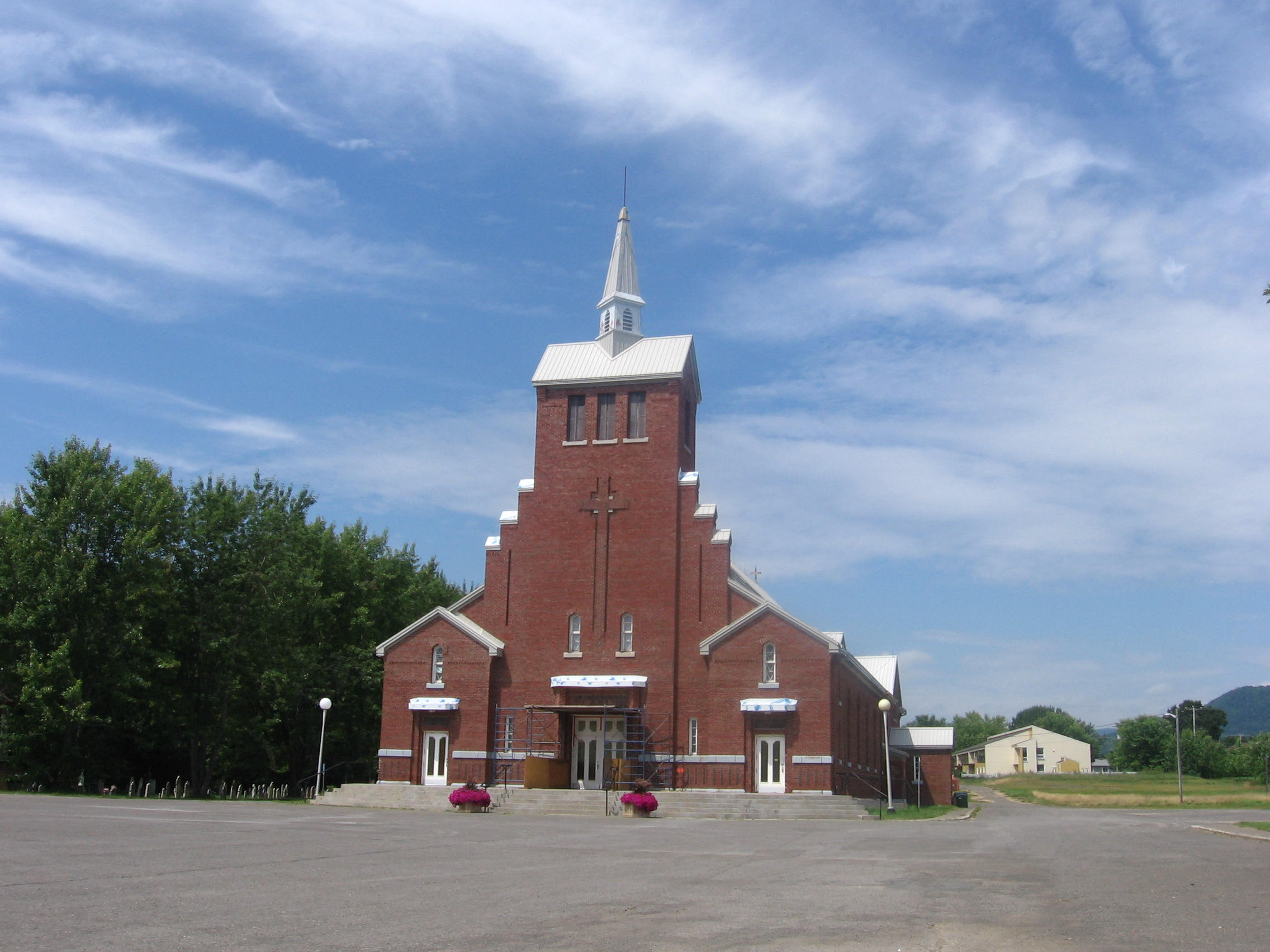 Église de Maria